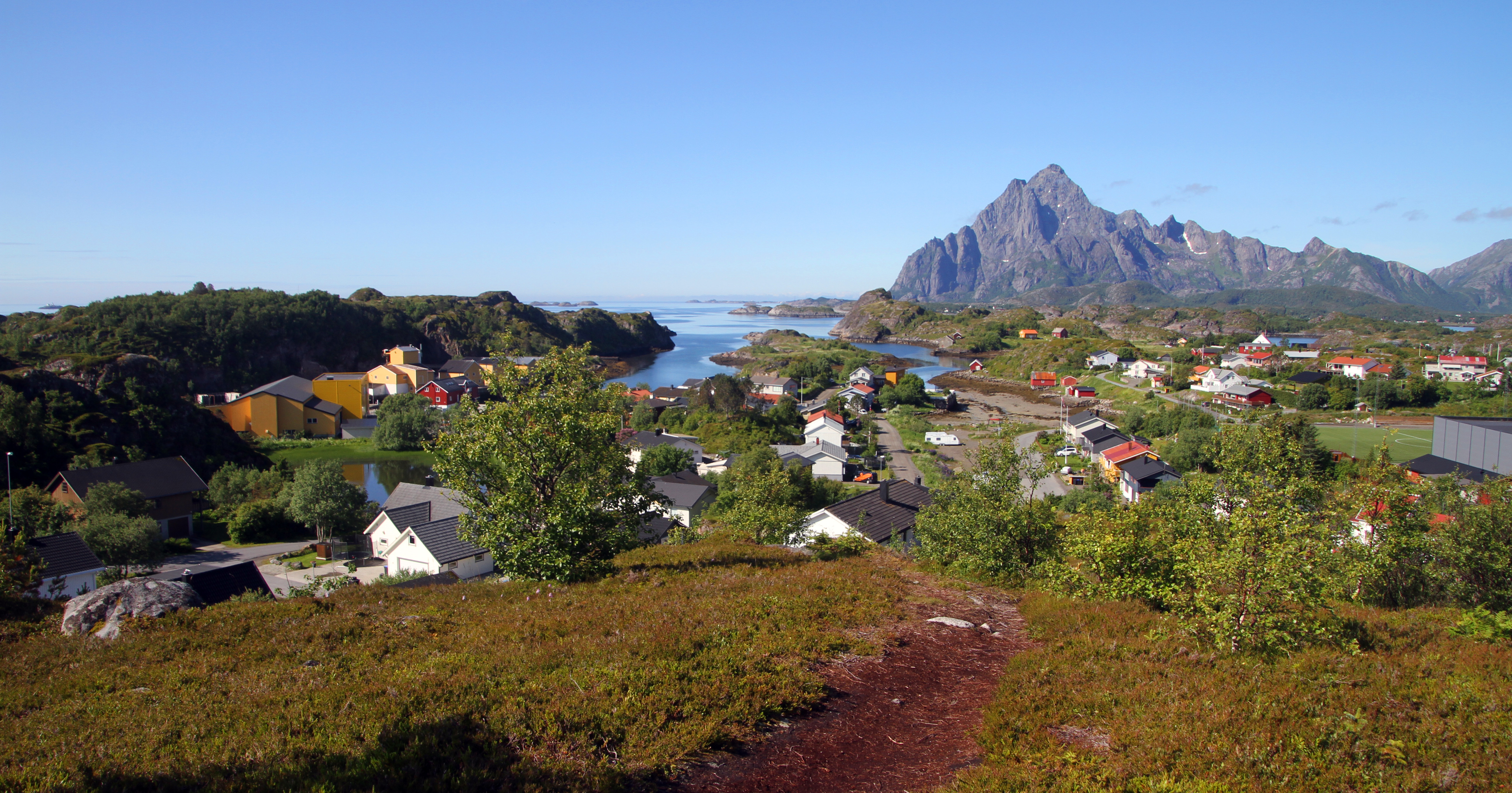 Kabelvåg, Austvågøy, Lofoten, Norwegen